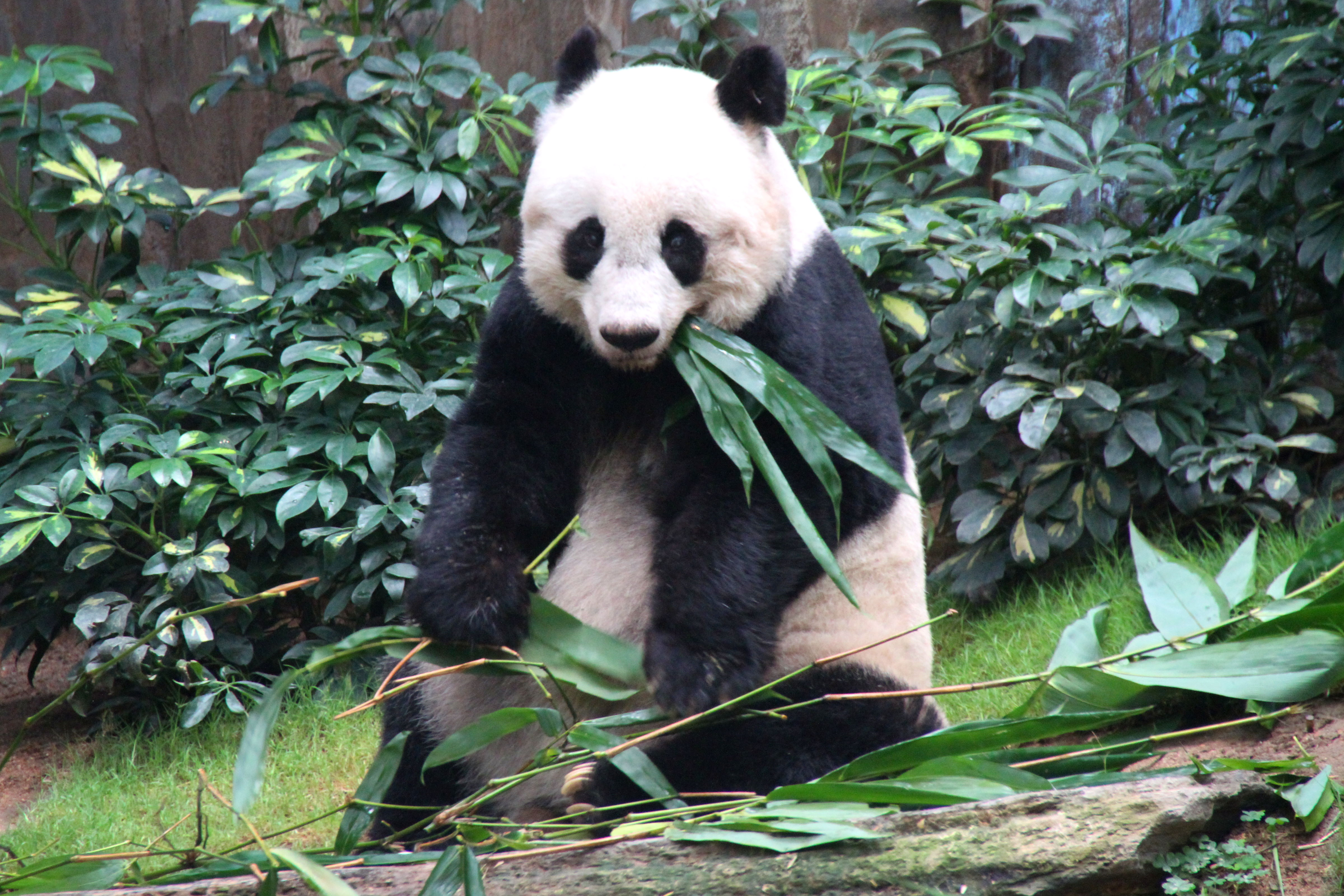 香港海洋公園大熊貓佳佳